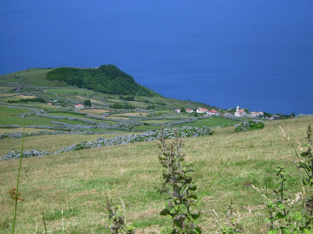 Vista parcial do Toledo visto do cimo da serra, localidade de Santo Amaro, Velas, ilha de São Jorge, Açores, Portugal